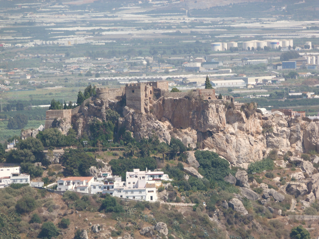 castillo de Salobreña (Granada)